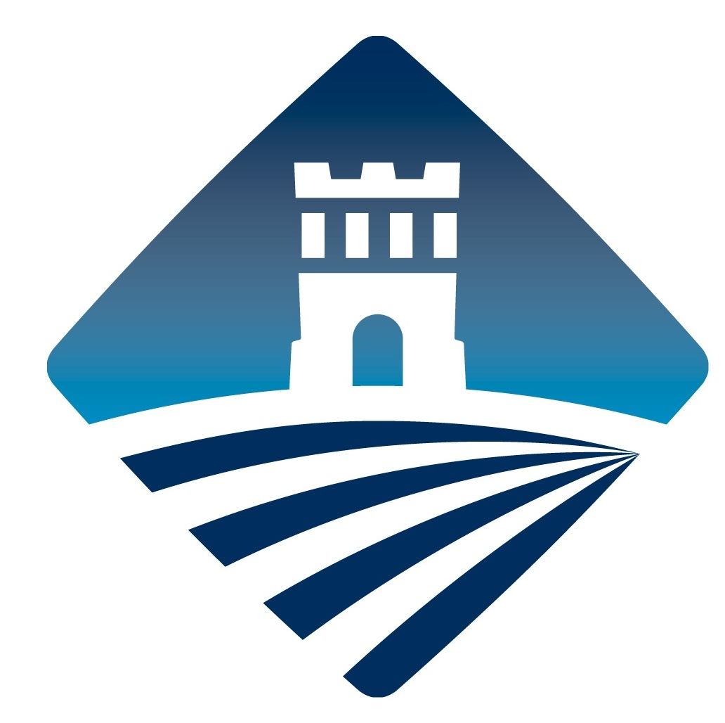 Escut Oficial